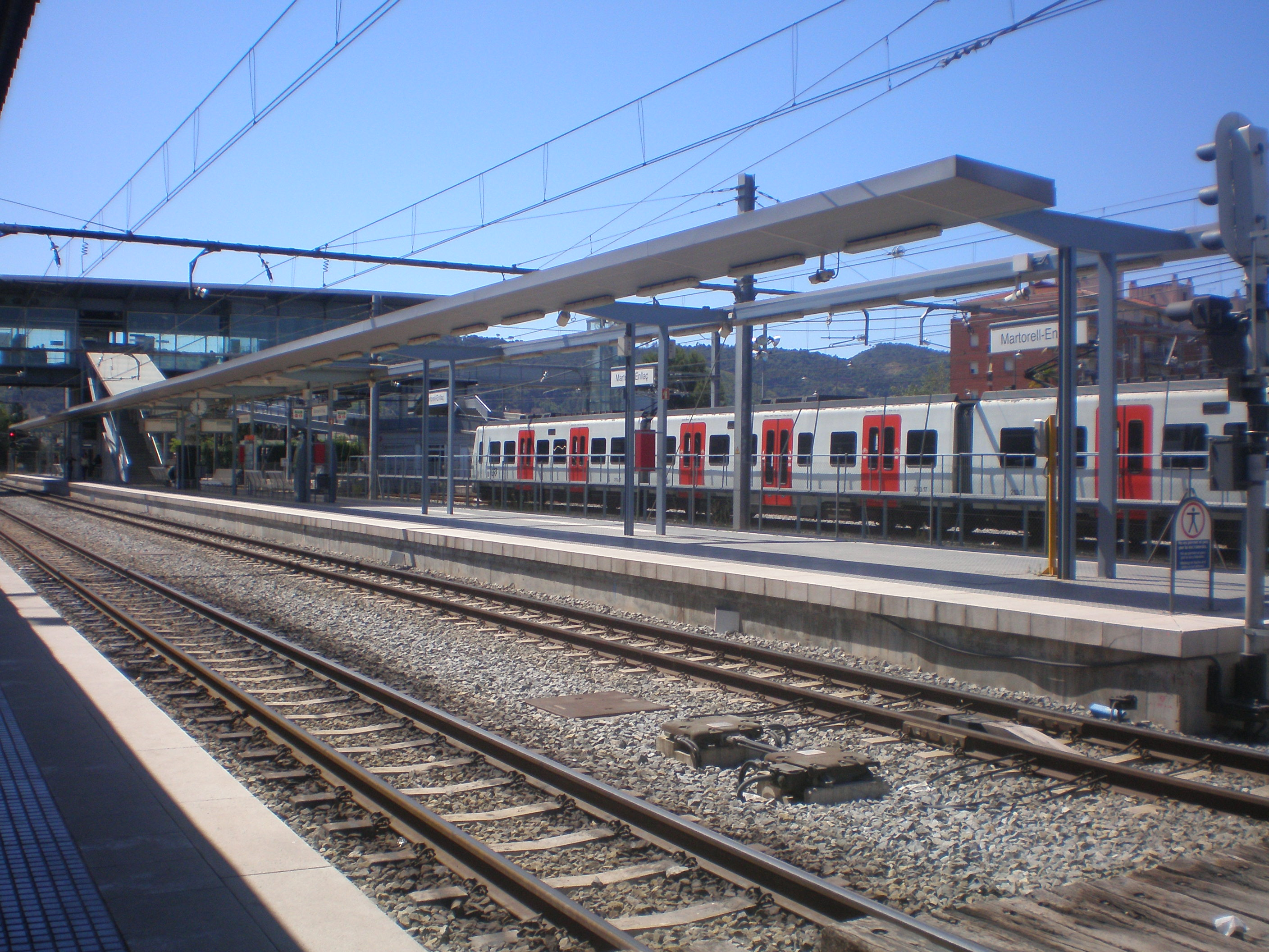 Vista general de l'estació de Martorell-Enllaç